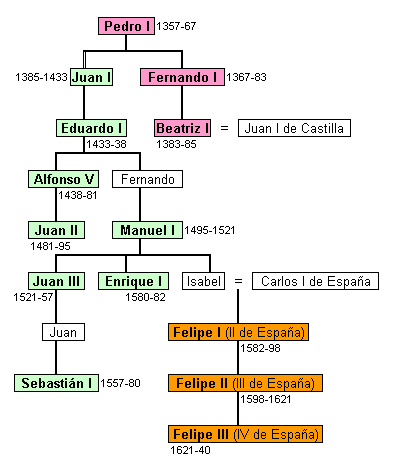 Árbol genealógico de los reyes de Portugal de las dinastías de Avis y de Austria